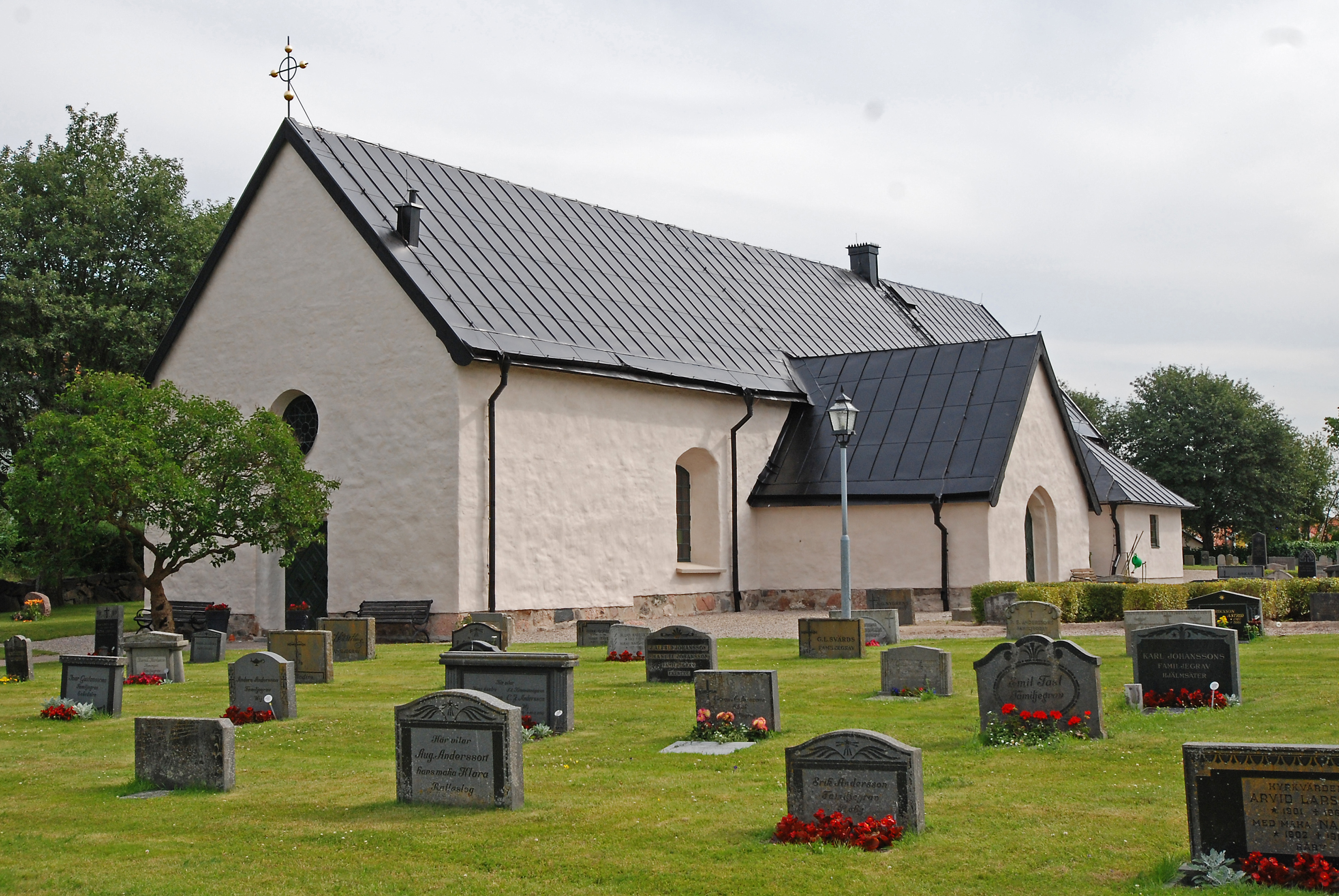 Västermo kyrka